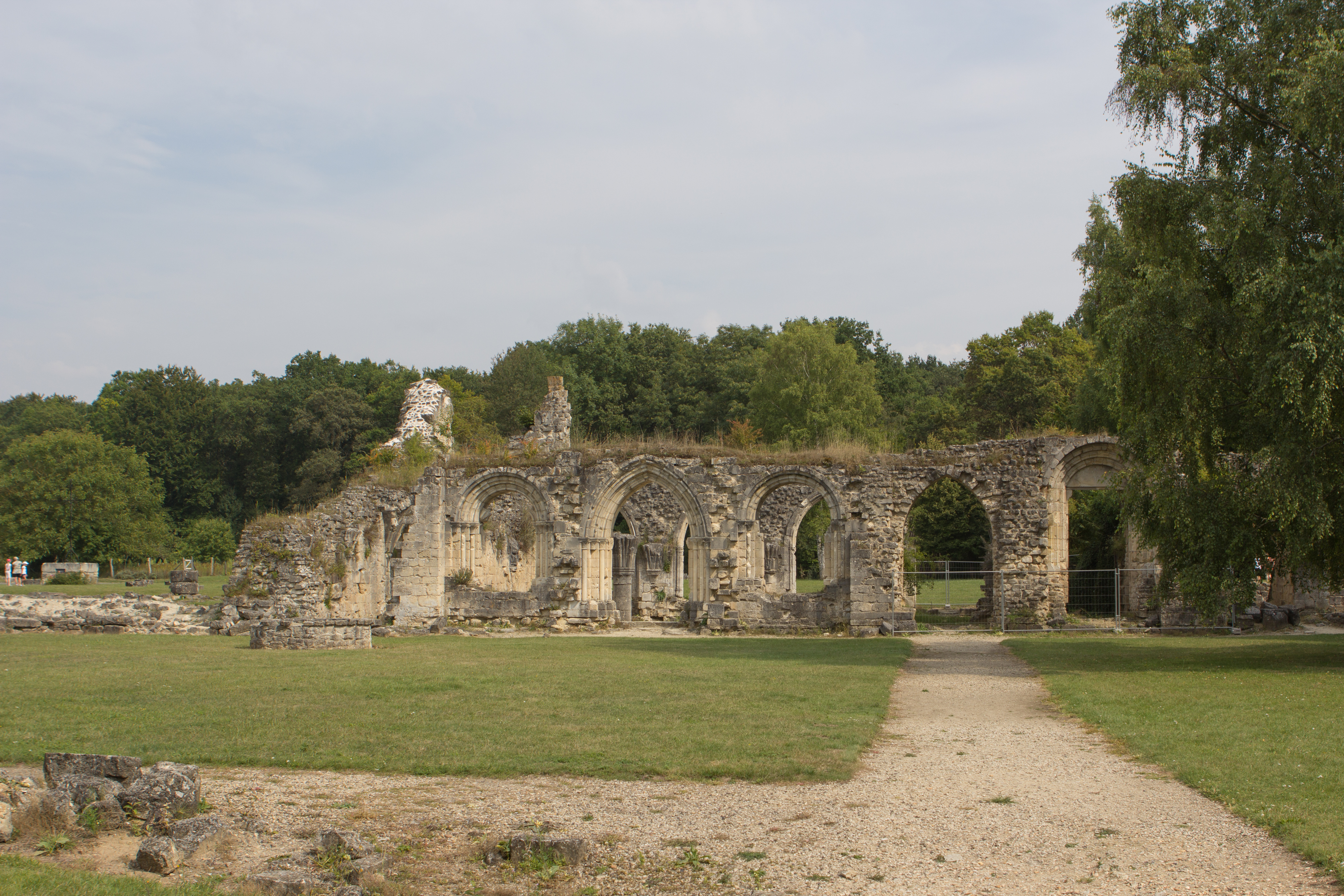 L'Abbaye de Vauclair, Bouconville-Vauclair, Aisne, France